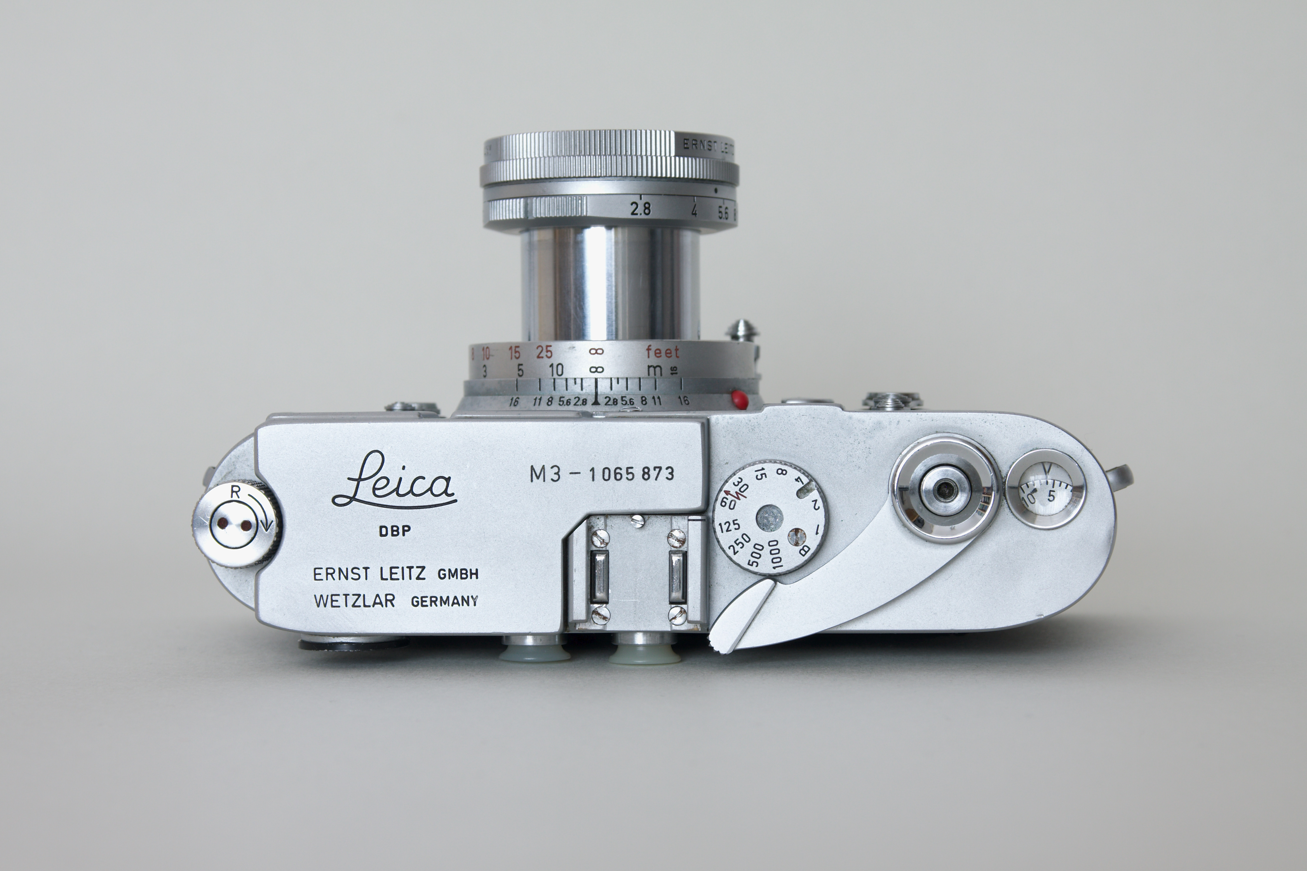 Leica M3 & Elmar 50mm f/2.8